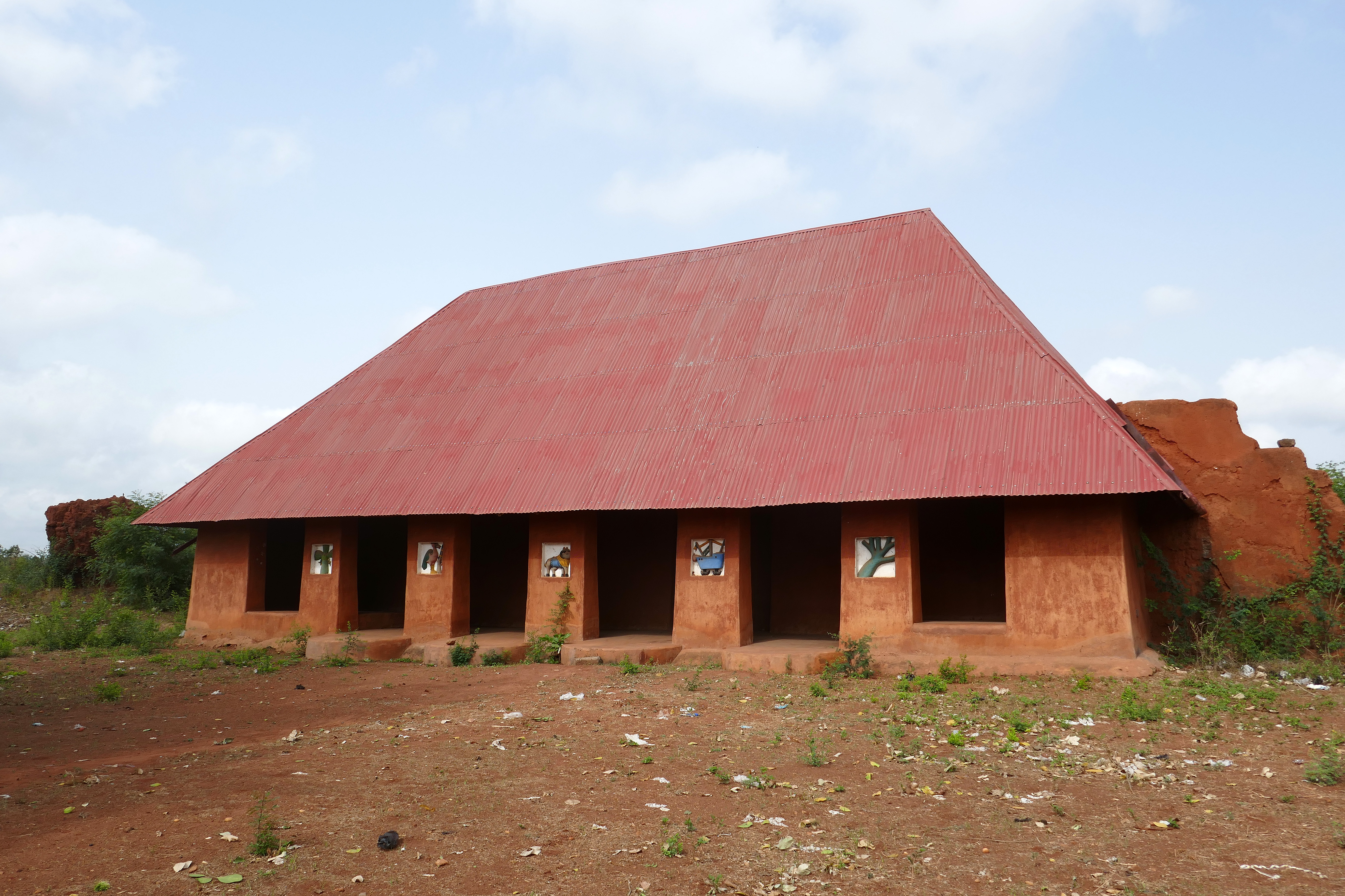 Abomey (Bénin) : palais du roi Agadja. Restauré dans le cadre d'un accord de coopération décentralisée avec la ville d'Albi.